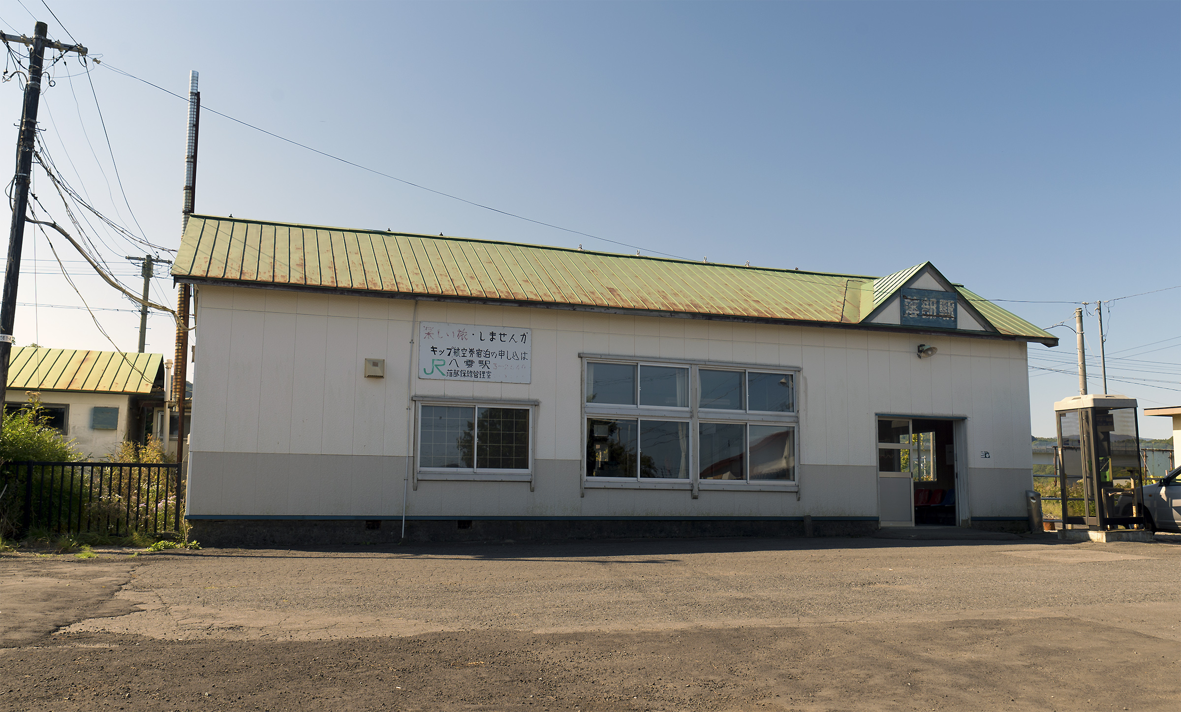 北海道旅客鉄道株式会社函館本線落部駅駅舎